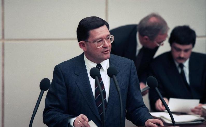 Bonn, 14.12.1990 In der ersten Sitzung des gesamtdeutschen Bundesrates in Bonn traf die Länderkammer die Entscheidung, die Beamtenbesoldung in den neuen Bundesländern für den Bereich der leitenden Beamten zu verbessern. Die neuen Bundesländer sollen ermächtigt werden, die im Einigungsvertrag vorgesehenen 35% eines entsprechenden westdeutschen Gehaltes durch einen nicht ruhegehaltsfähigen Zuschuß von 14% aufzustocken. Die Entscheidung des Bundesrates muß durch die Bundesregierung in Kraft gesetzt werden.